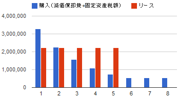 以下の条件で作成したリース及び購入の比較グラフ 飲食店業用設備 耐用年数 8年 減価償却方法 定率法 償却率 0.313 改訂償却率 0.334 保証料率 0.05111 償却保証額 511,100 物件金額 10,000,000 リース期間(月) 60 リース料率 1.85 月額リース料 185,000 リース料総額 11,100,000 固定資産税率 0.014